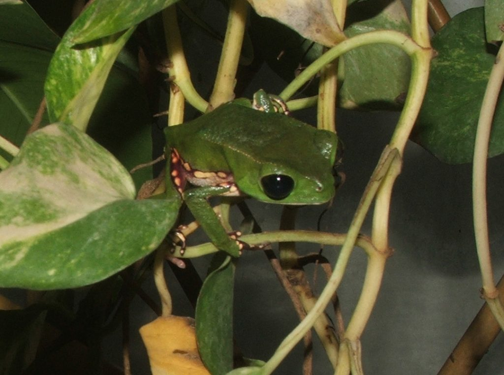 Author: Klemens Bottig source: eigene Fotografie